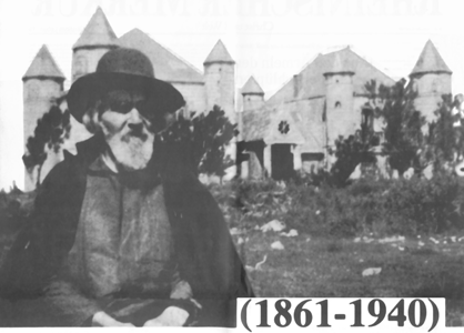 Saint-Pol-Roux (1861-1940) vor seinem Manoir de Coecilian Foto (Plakat) / Verlag Rolf A. Burkart (1986)